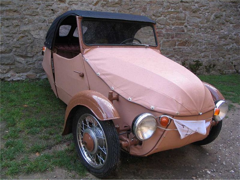 Velorex 16/175, Lipnice nad Sazavou (Csehország)